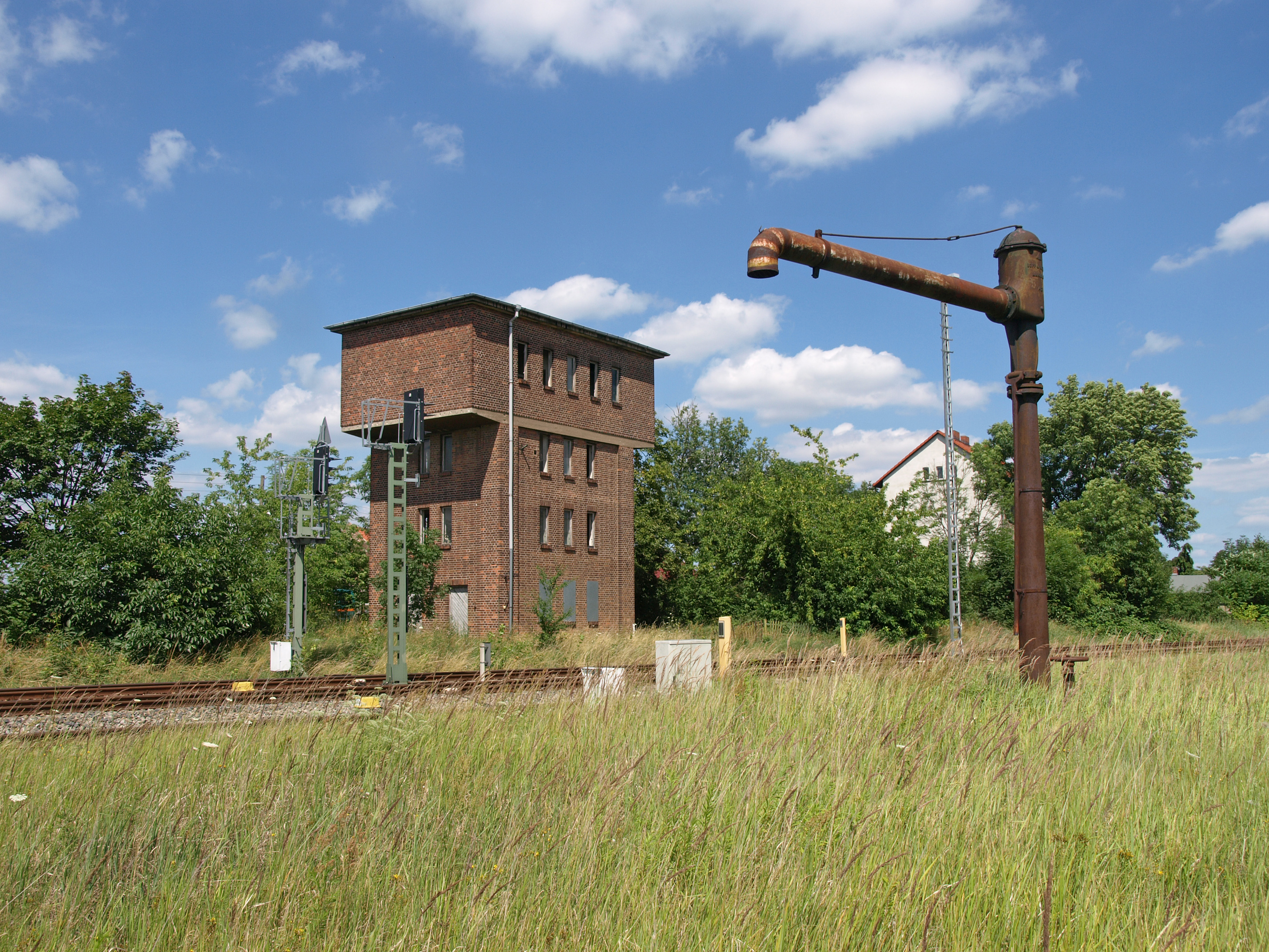 Wasserturm und Wasserkran am Bahnhof Küstrin-Kietz